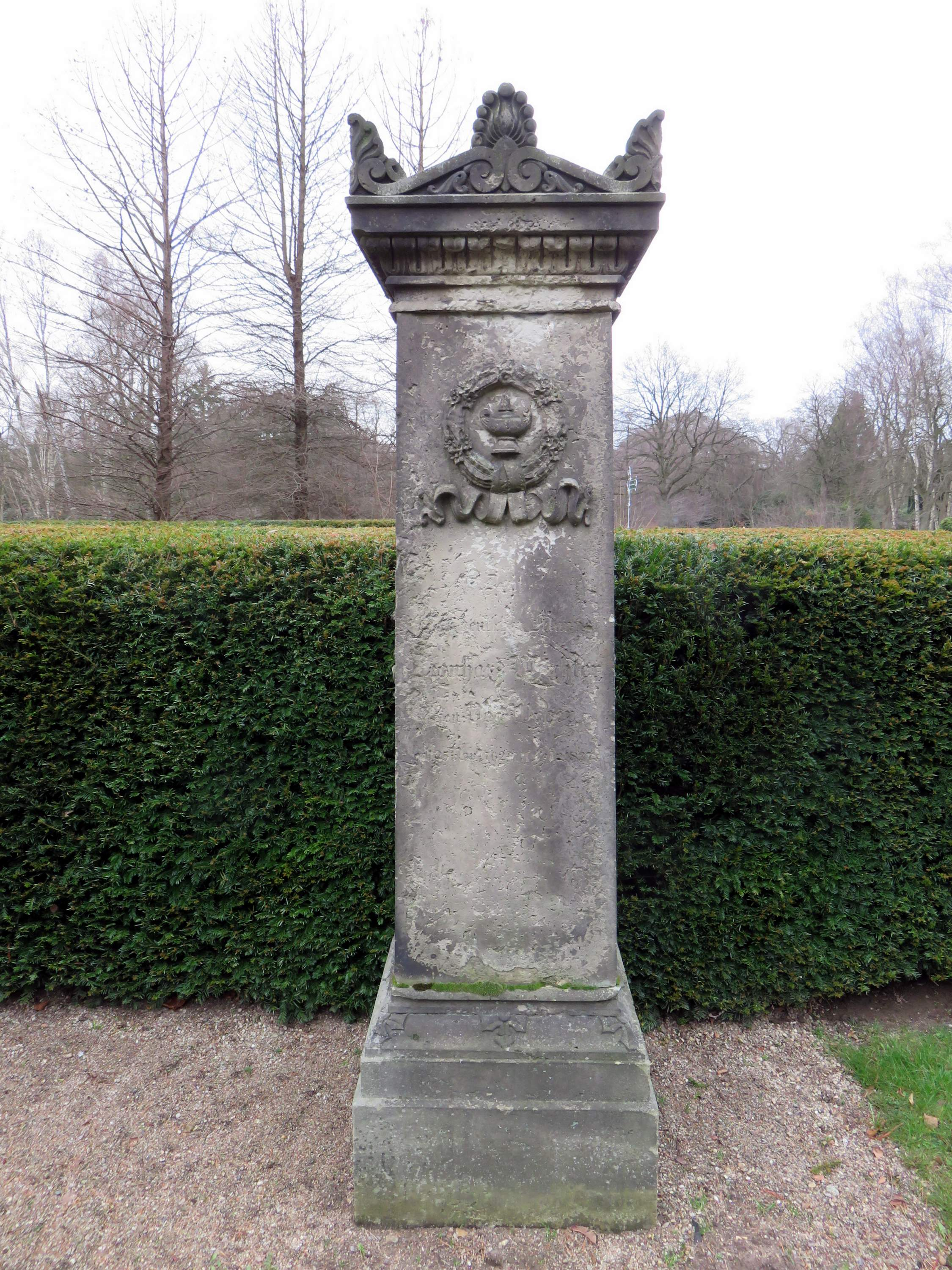 Grabmal für den Schriftsteller Leonhard Wächter (Pseudonym Veit Weber; 1762–1837) im Grabmal-Freilichtmuseum Heckengarten auf dem Hamburger Friedhof Ohlsdorf, Inschrift bei .